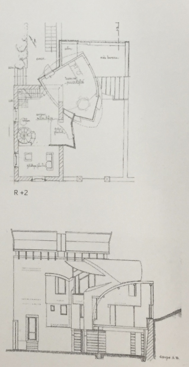 Bernard Herbecq- Rénovation en auto-construction de la morgue de l’hôpital des Anglais